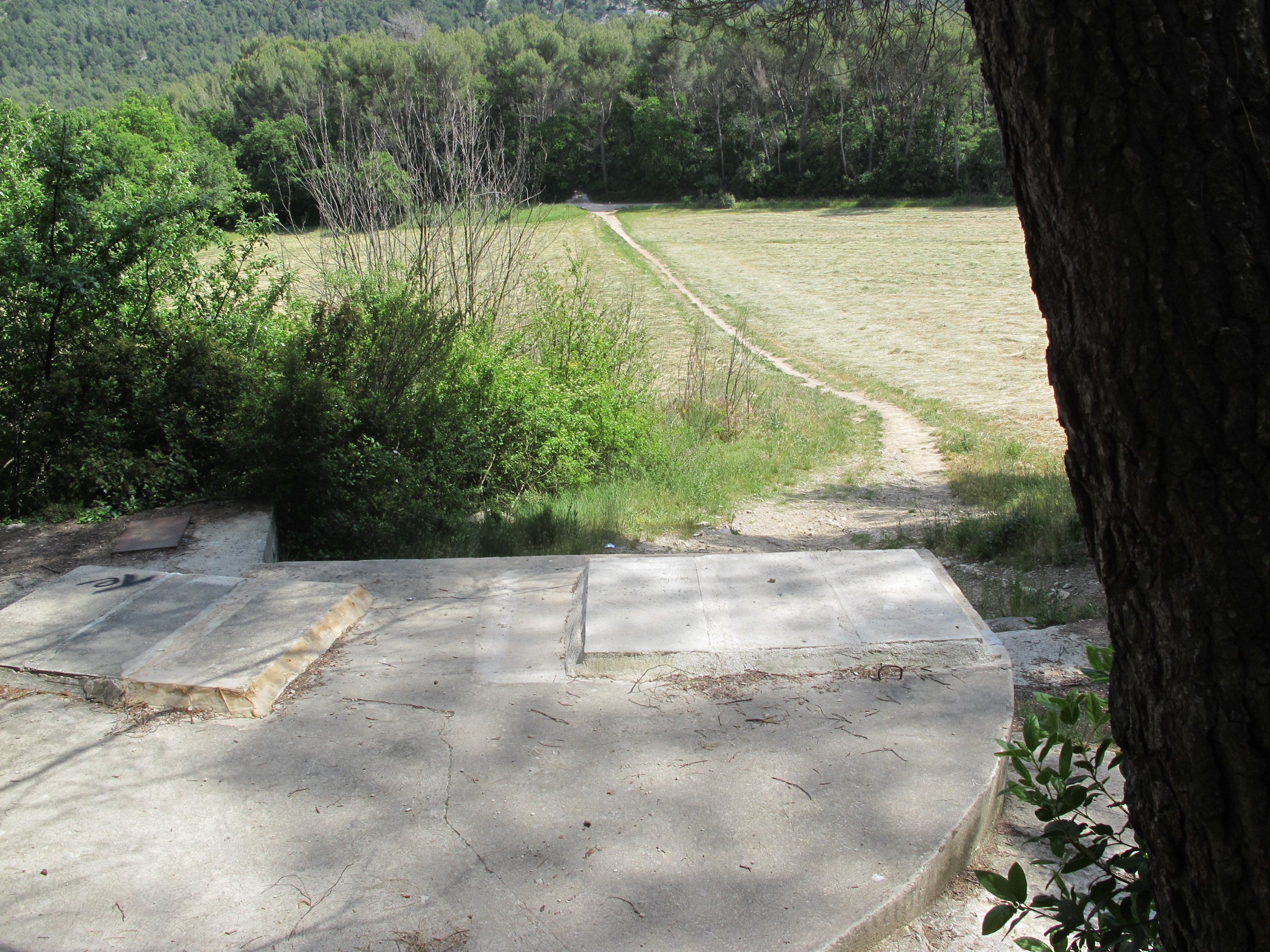 Le siphon du Champ de Lambert, sur la rigole de Carpiagne, vu de l'amont. On est sur l'arrivée du canal (ici couvert), on voit la trace de la canalisation souterraine, l'extrémité du siphon se trouve au fond, dans les arbres.